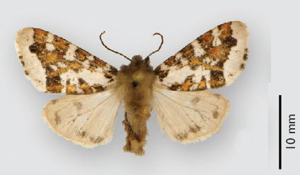 Leichosila talamanca male